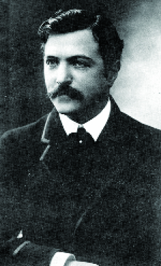 Эдмон Флег